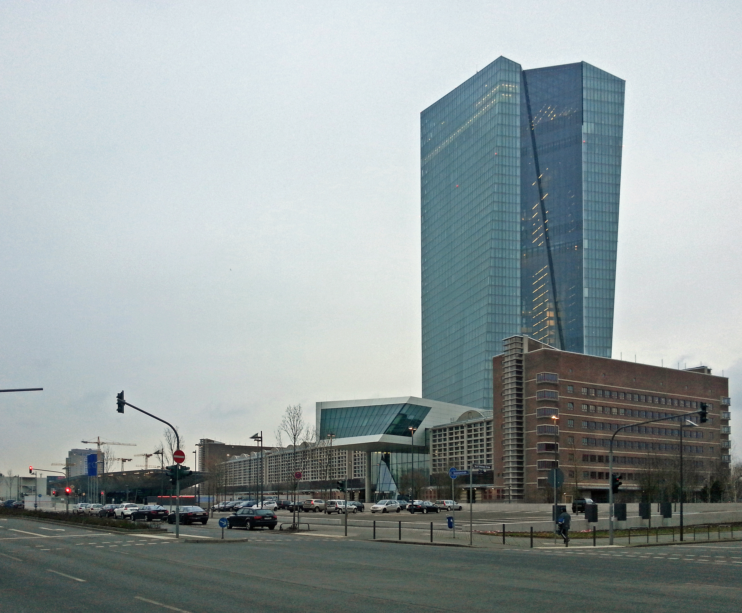 Das neue EZB-Hauptquartier an der Sonnemannstraße 20 in Ffm-Ostend, im Januar 2015.